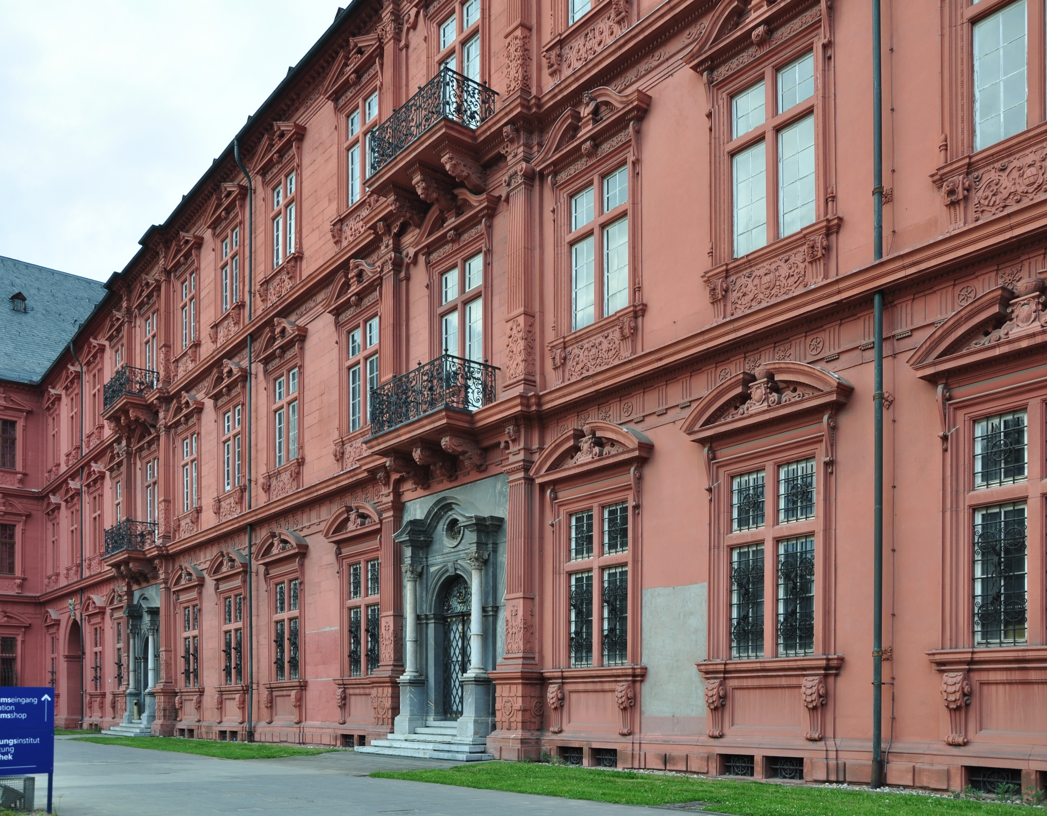 Mainz, Kurfürstliches Schloss